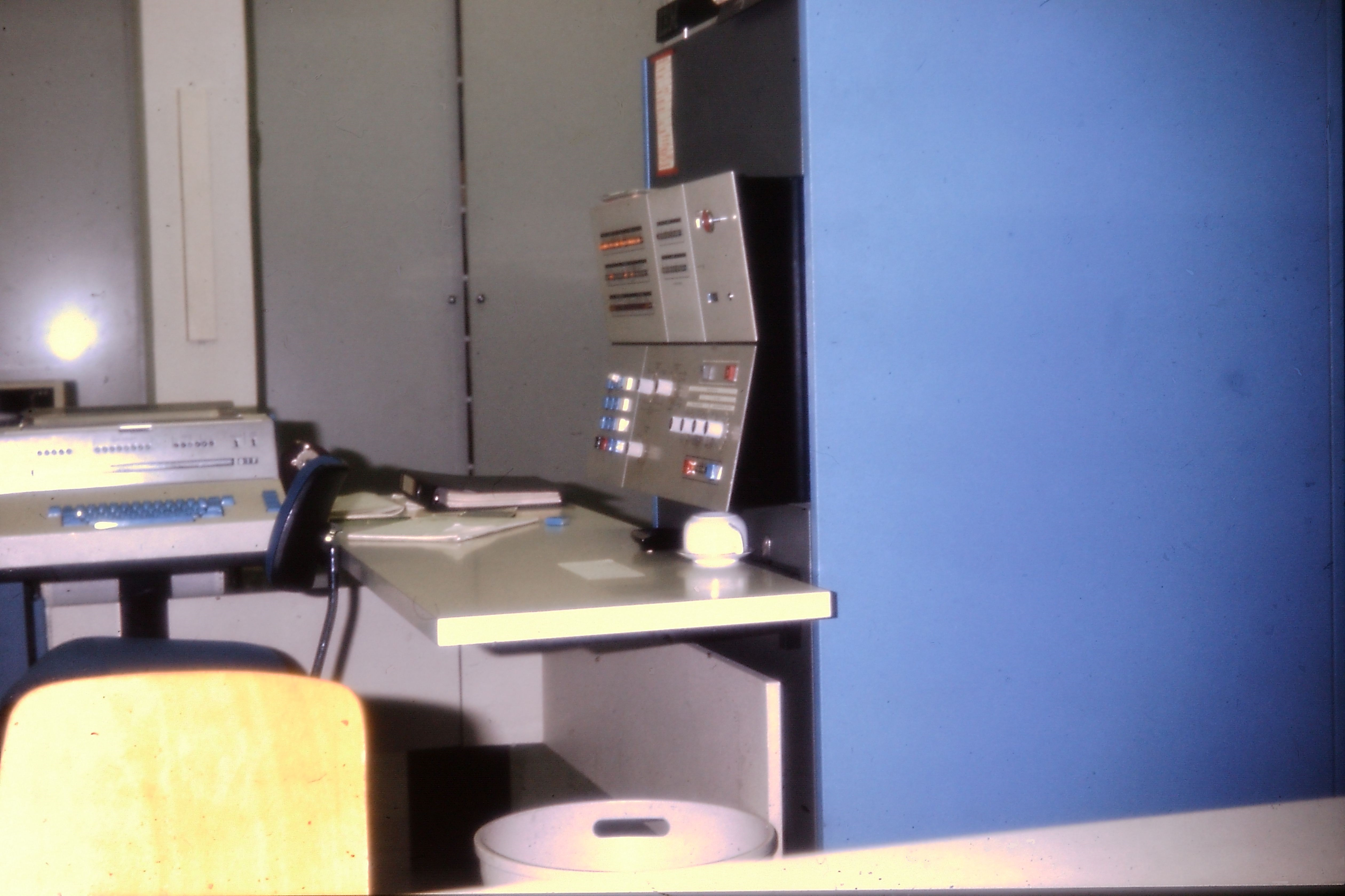 Ein System/360 zur Elektronischen Datenverarbeitung in Wien (1972)